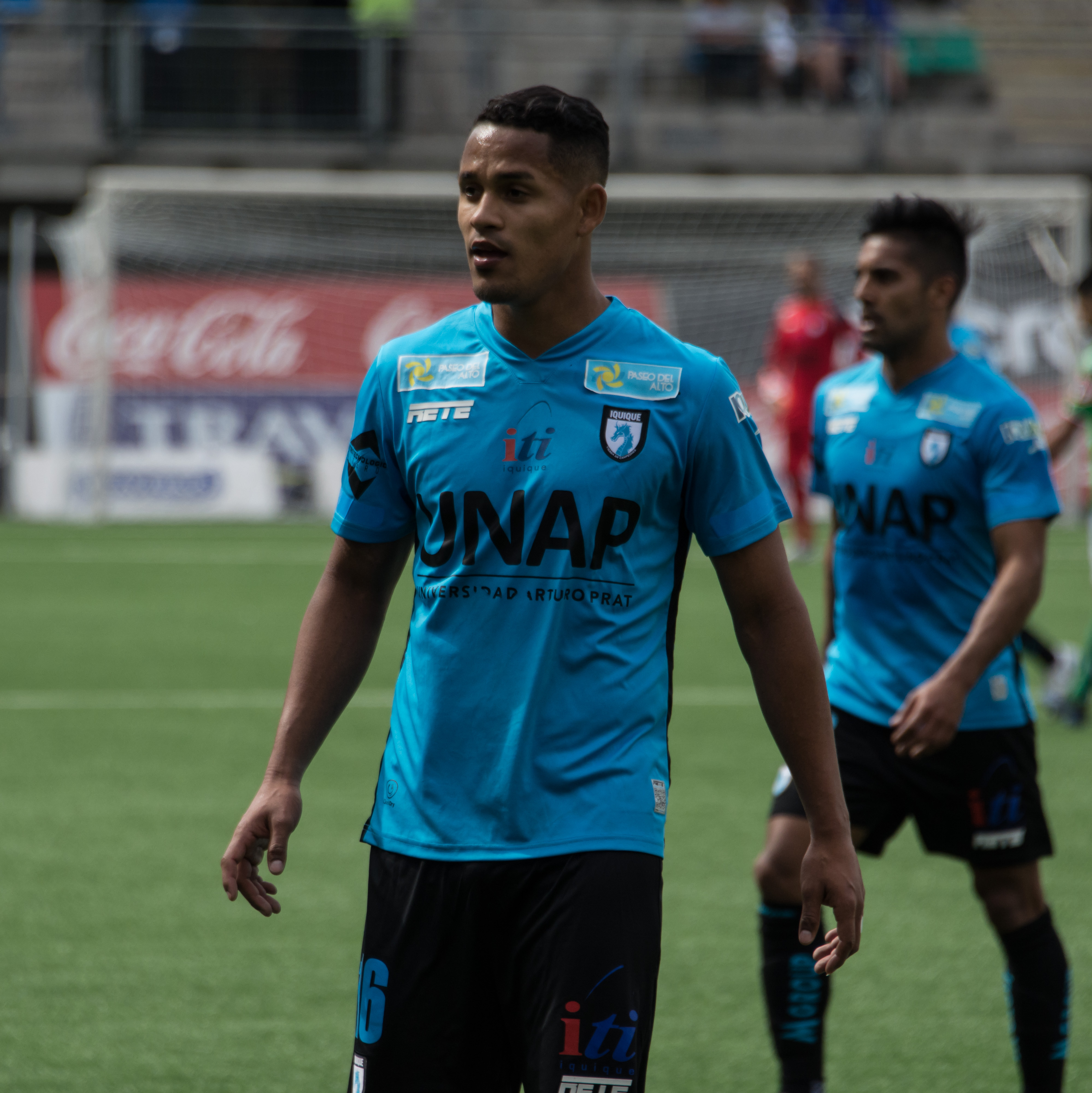 Edwuin Pernía, Audax Italiano v Deportes Iquique, Estadio Bicentenario de La Florida, La Florida, Santiago, Chile